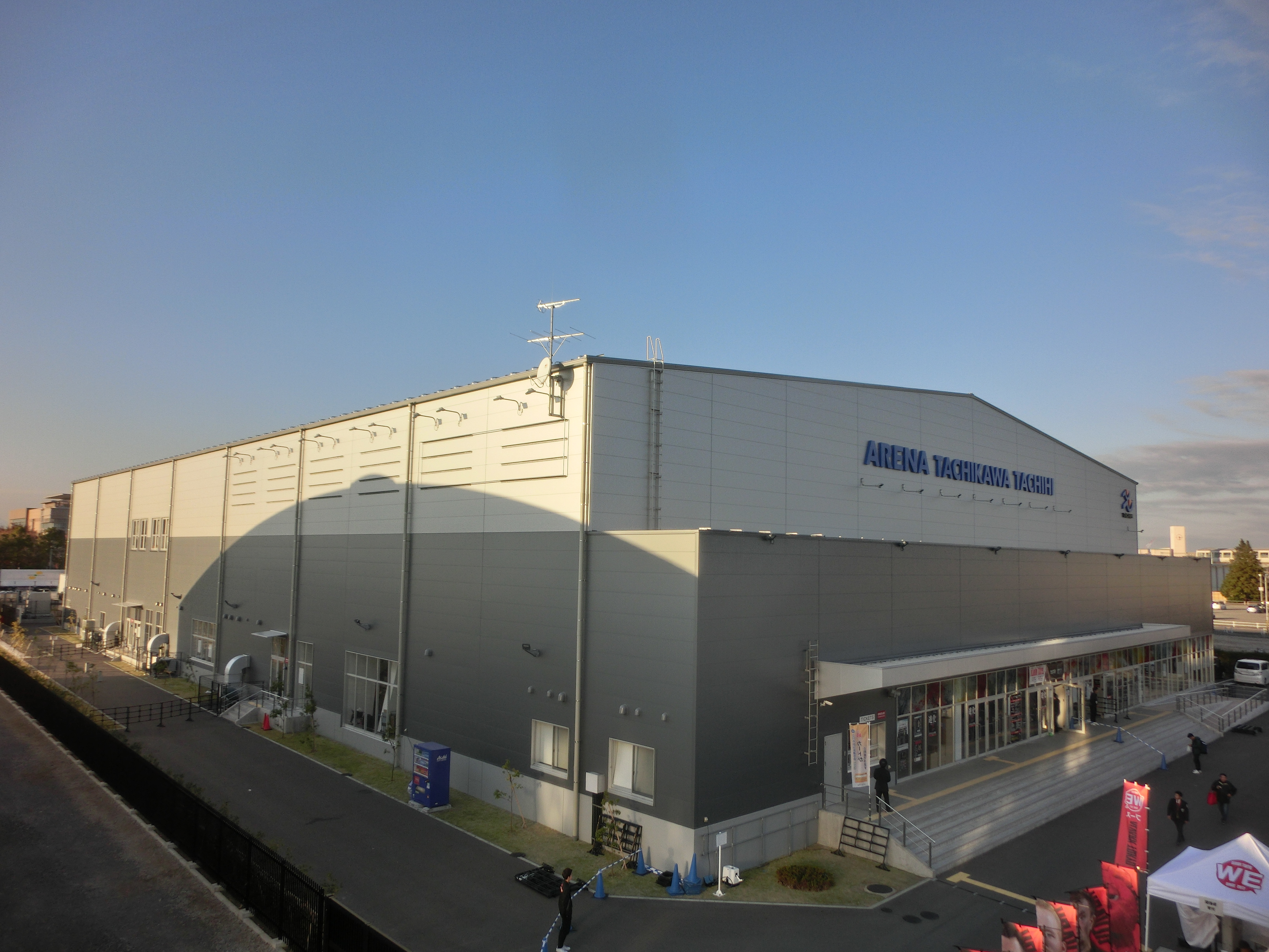 アリーナ立川立飛（立飛駅から撮影）